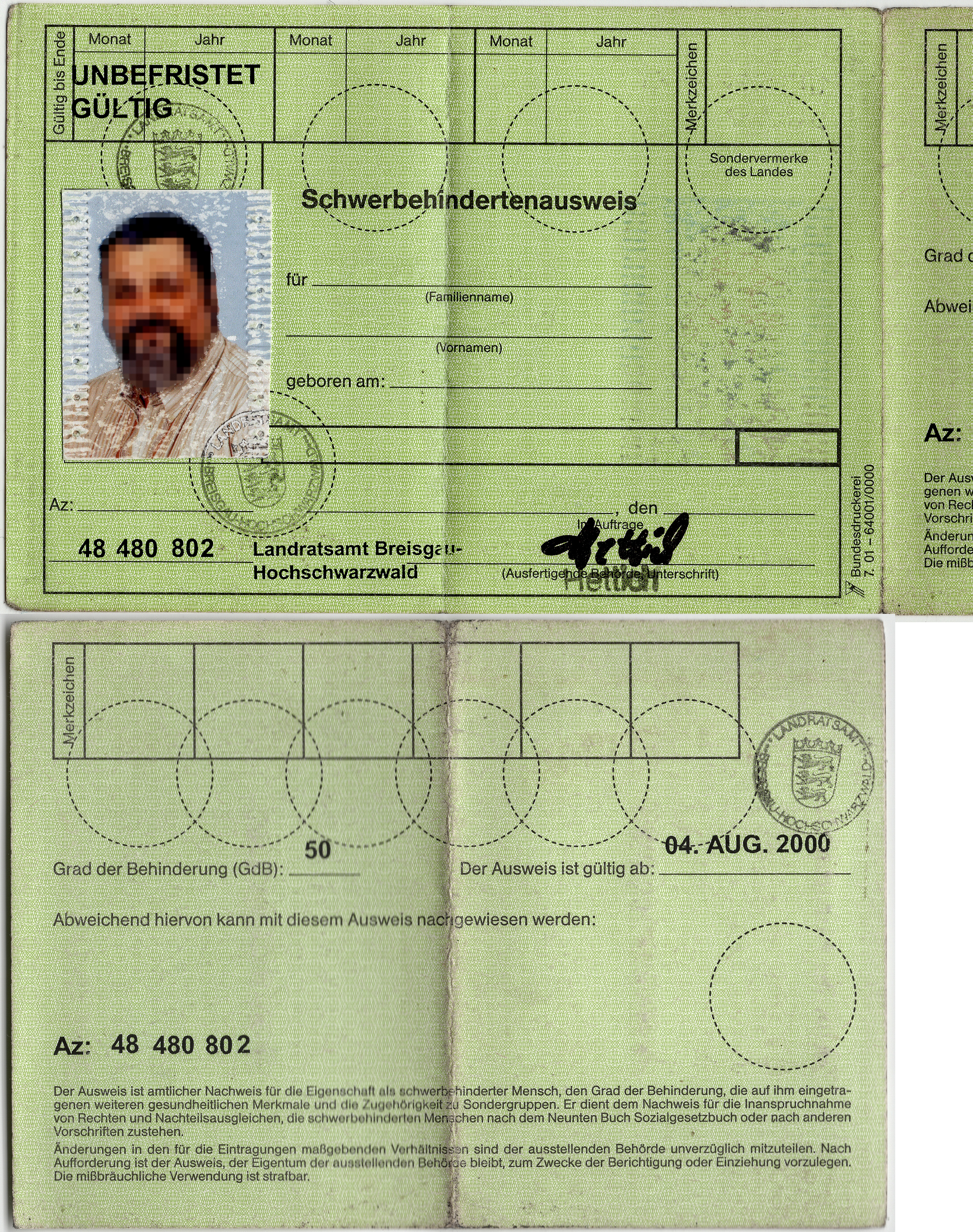 Specimen eines Schwerbehindertenausweises, alte Form, alle Daten verändert.